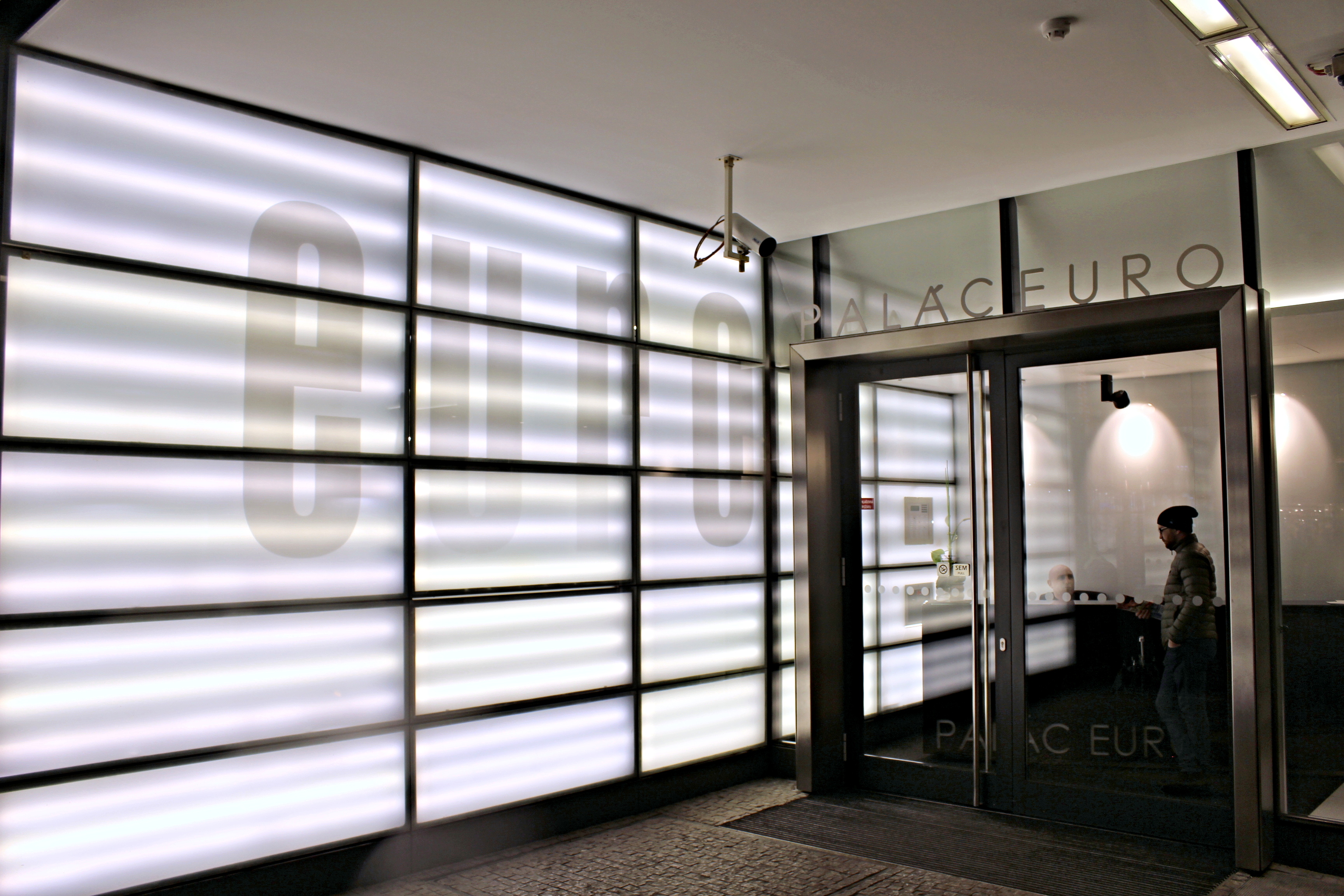 Palác Euro (Václavské náměstí)